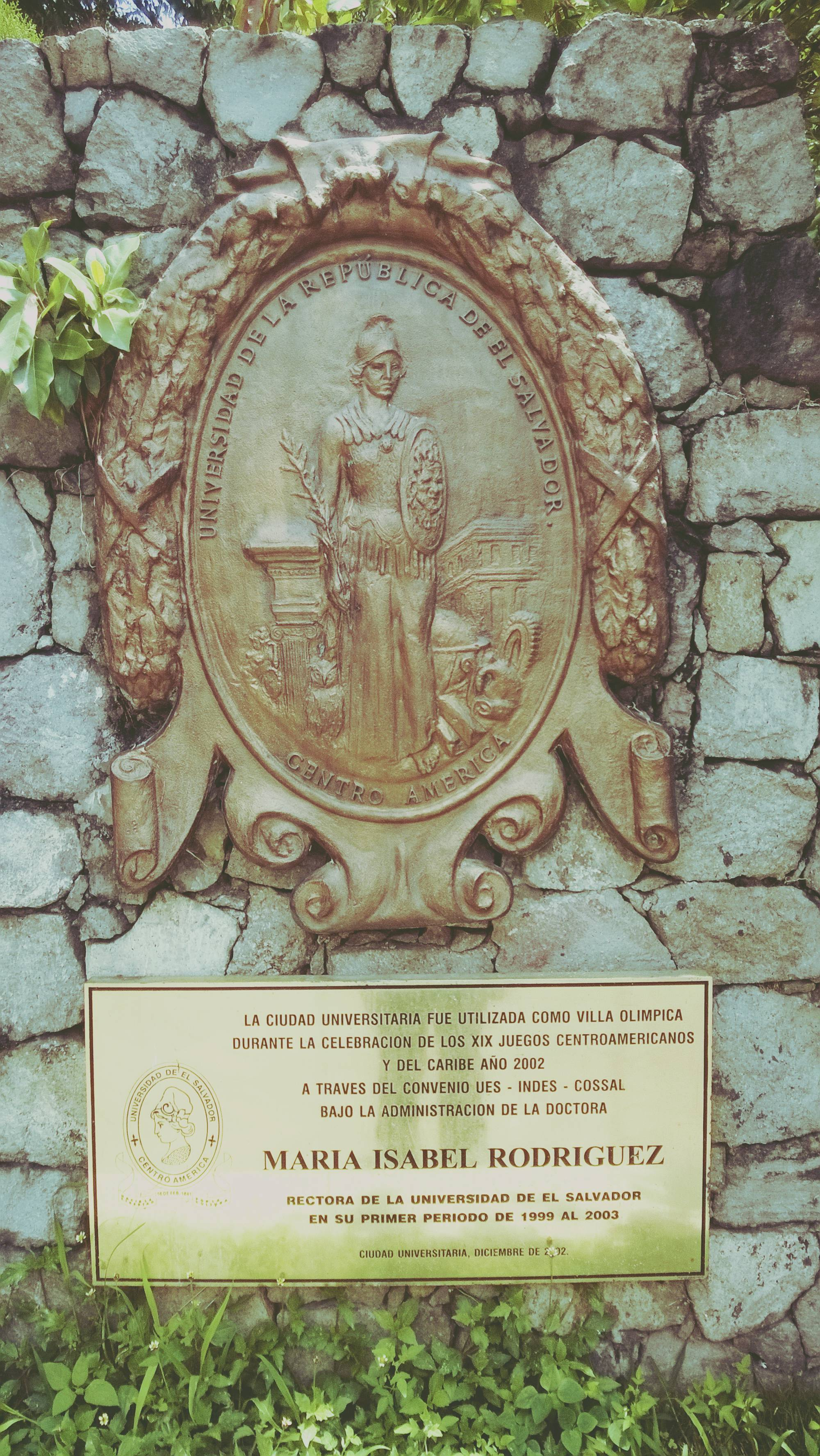 Placas de identificación ubicadas en la entrada de la Universidad de El Salvador. a) Escudo de la UES (con la imagen de la Minerva). b) Placa de los XIX Juegos Centroamericanos y del Caribe 2002 colocada cuando María Isabel Rodríguez se desempeñaba como rectora.